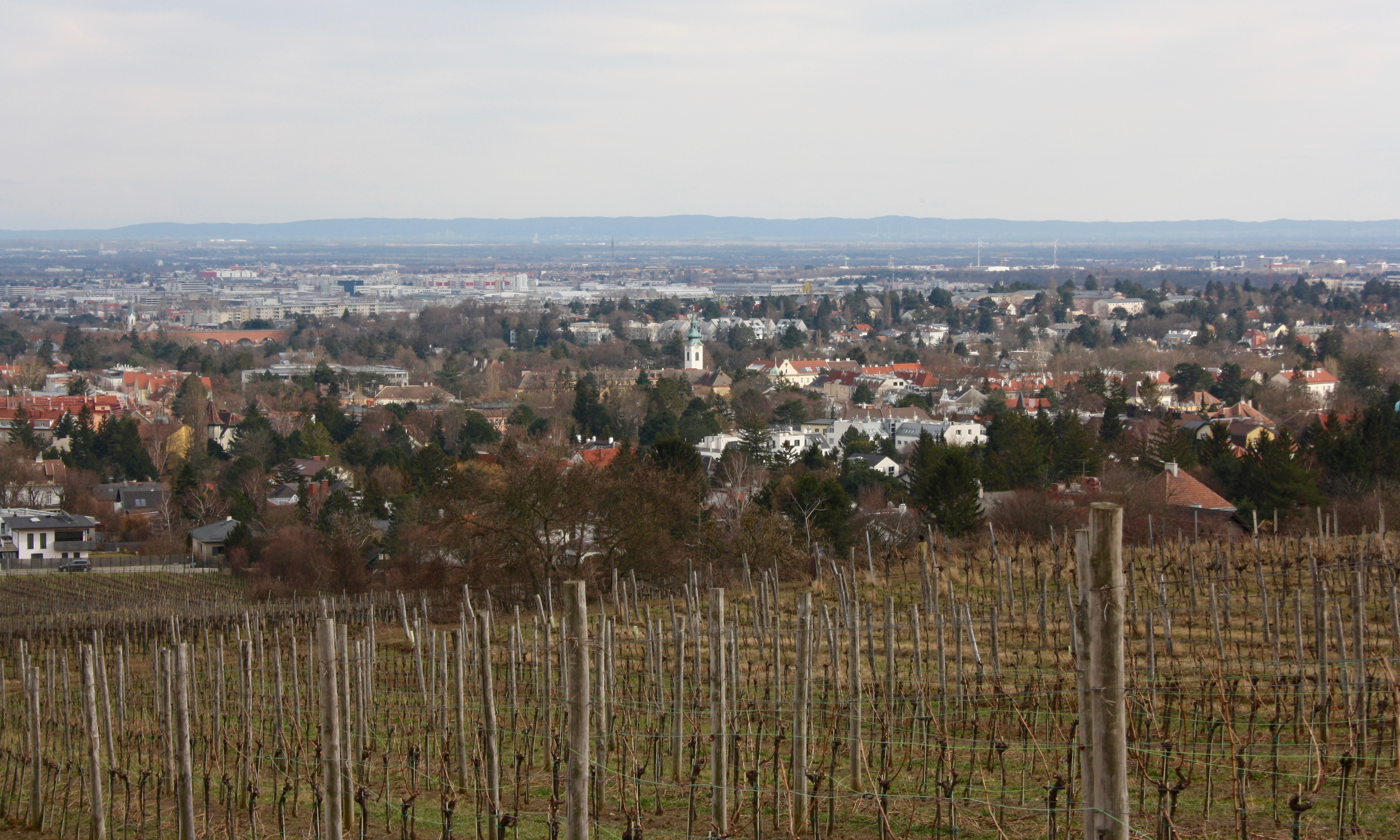 Blick vom Kadoltsberg auf das Ortszentrum von Wien-Mauer.